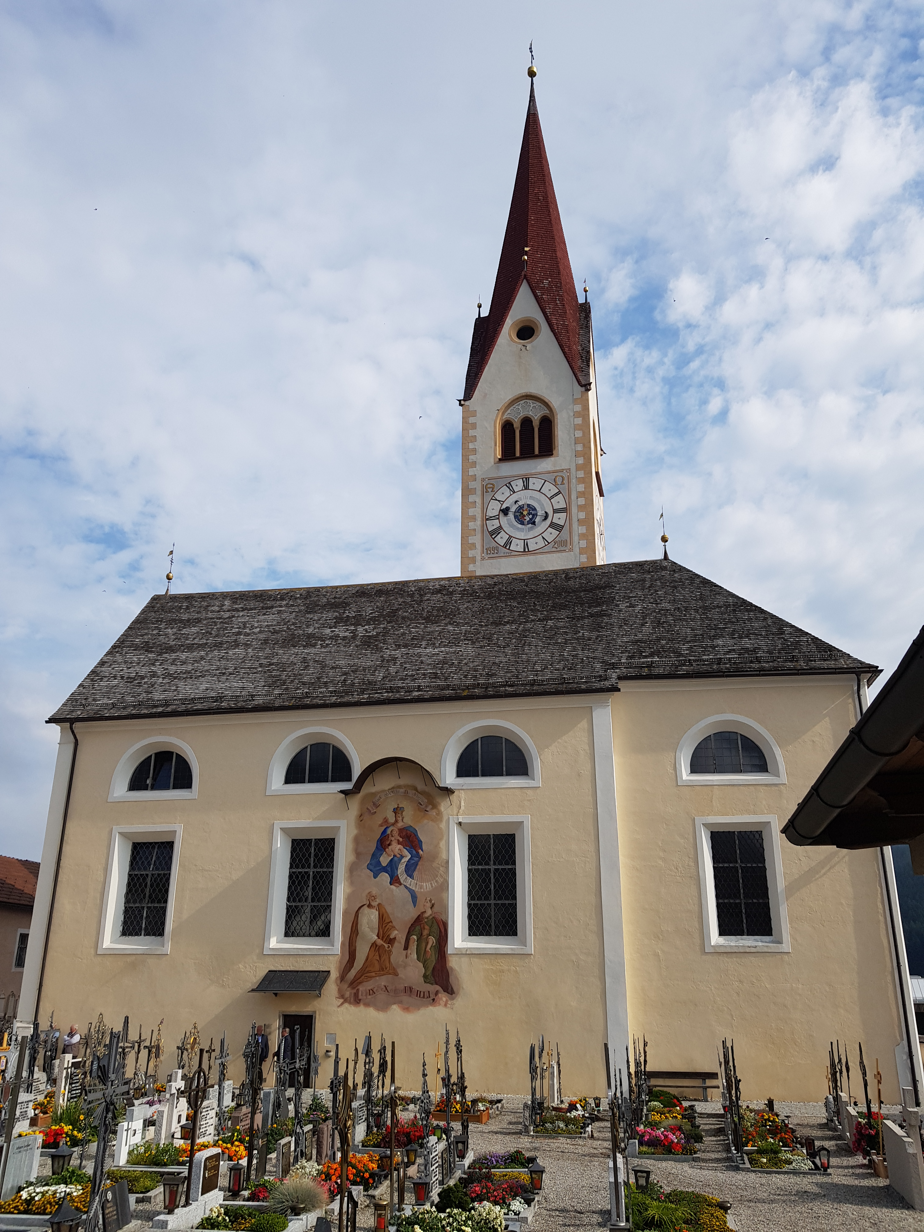 St. Petrus und Agnes, Niederolang, Südtirol